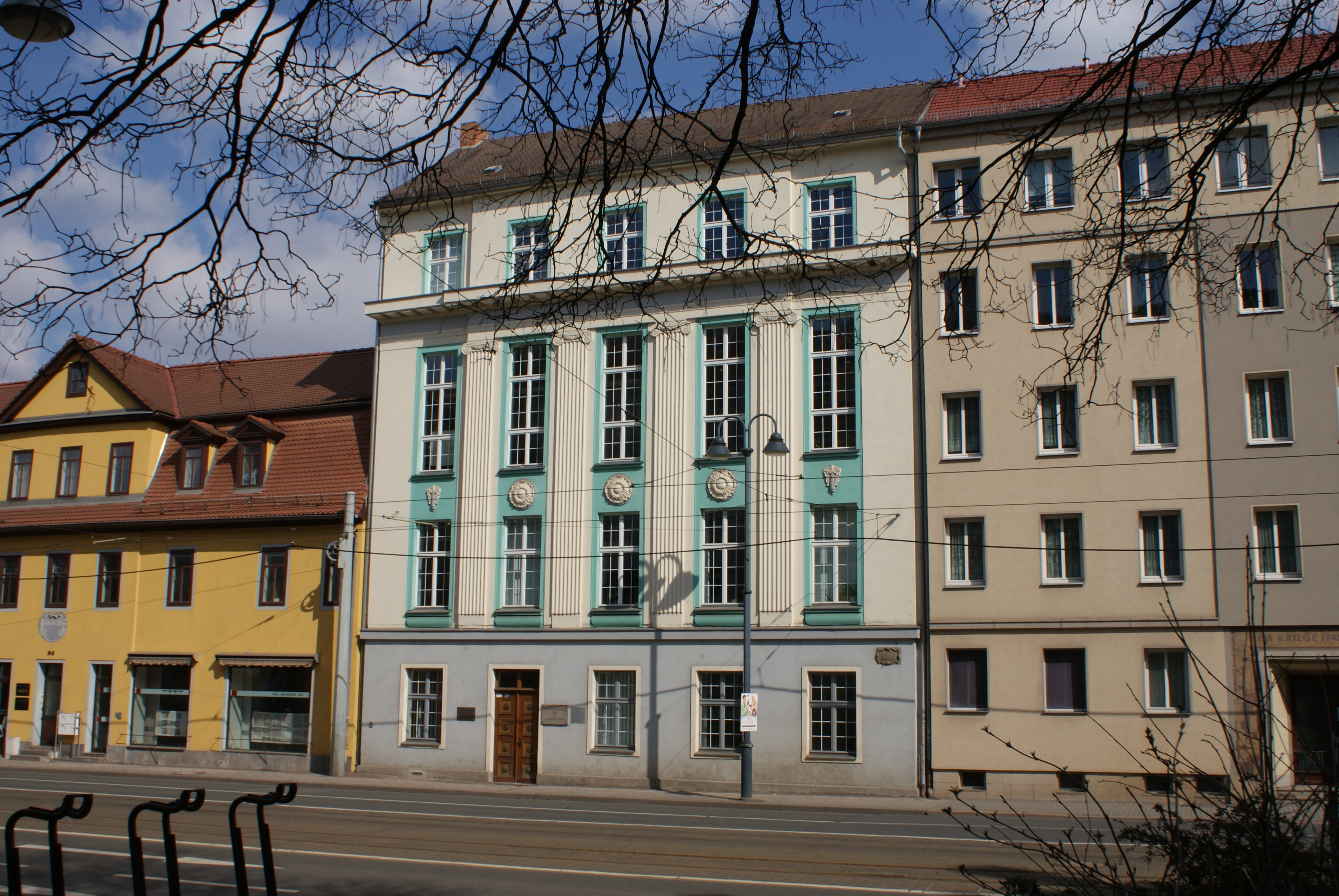 Gebäude des Bereichs für Ur- und Frühgeschichte der Friedrich-Schiller-Universität Jena